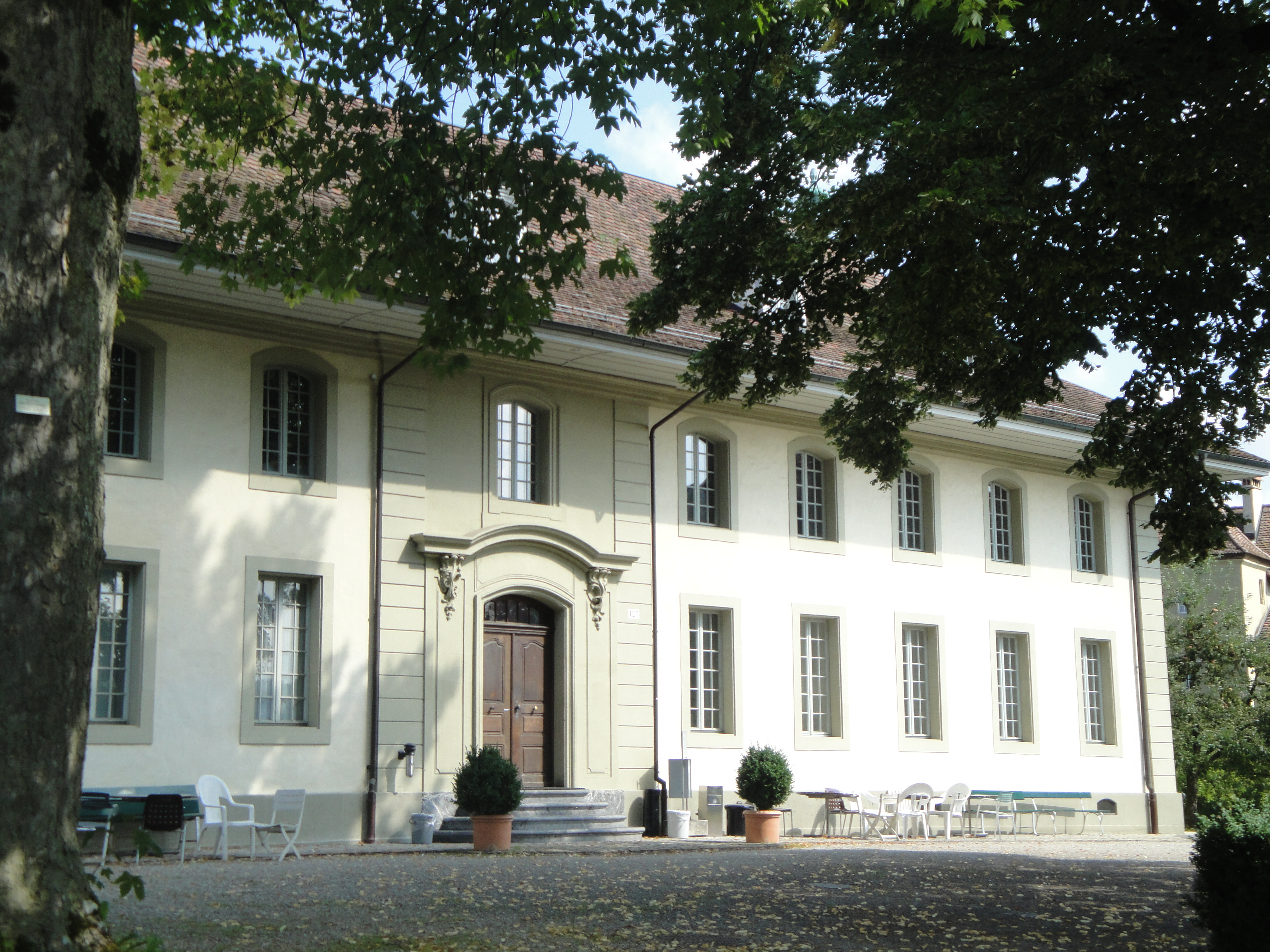 Bern Waldau, Pfrundhaus